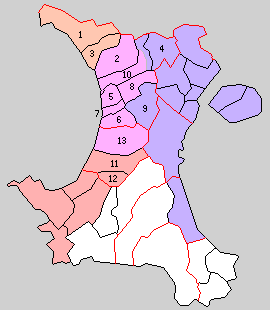 後の鹿児島県日置郡域の町村制時点の町村。